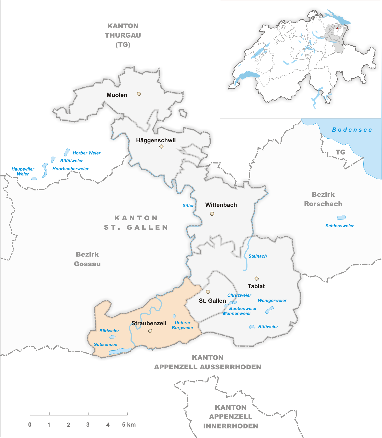 Municipality Straubenzell Artist: Tschubby